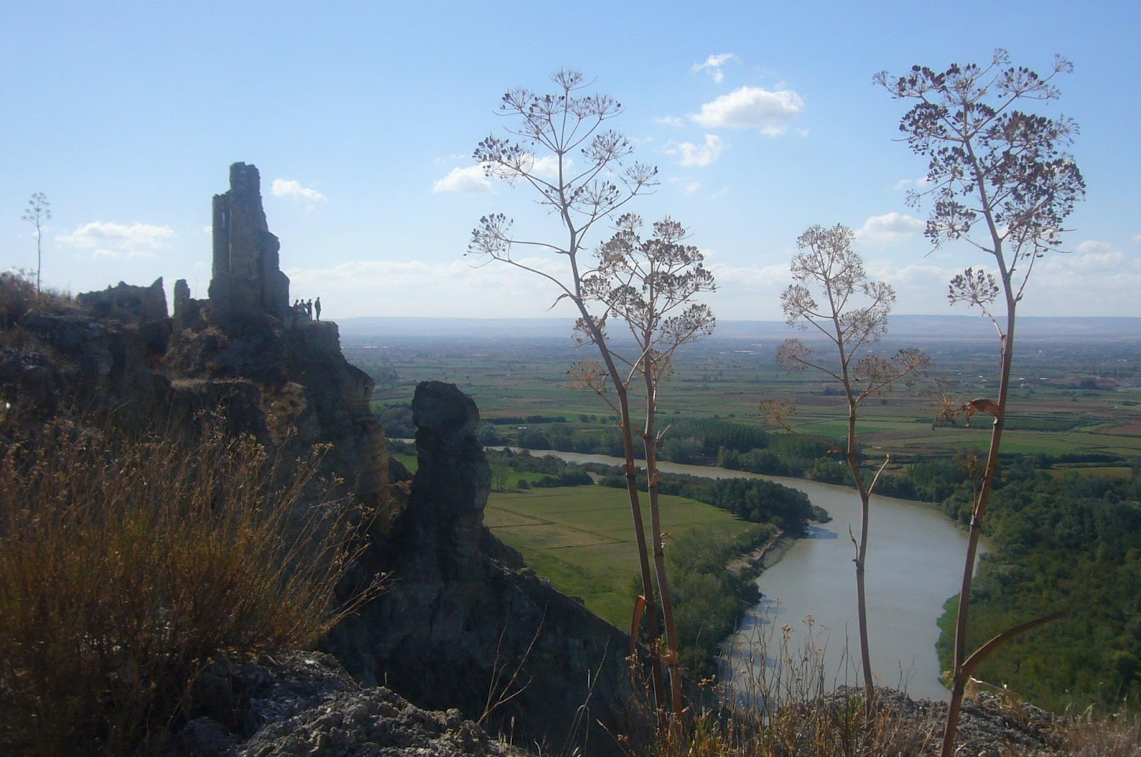 Vega del Ebro vista desde las ruinas de la ciudad de El Castellar (Torres de Berrellén, Zaragoza, España).